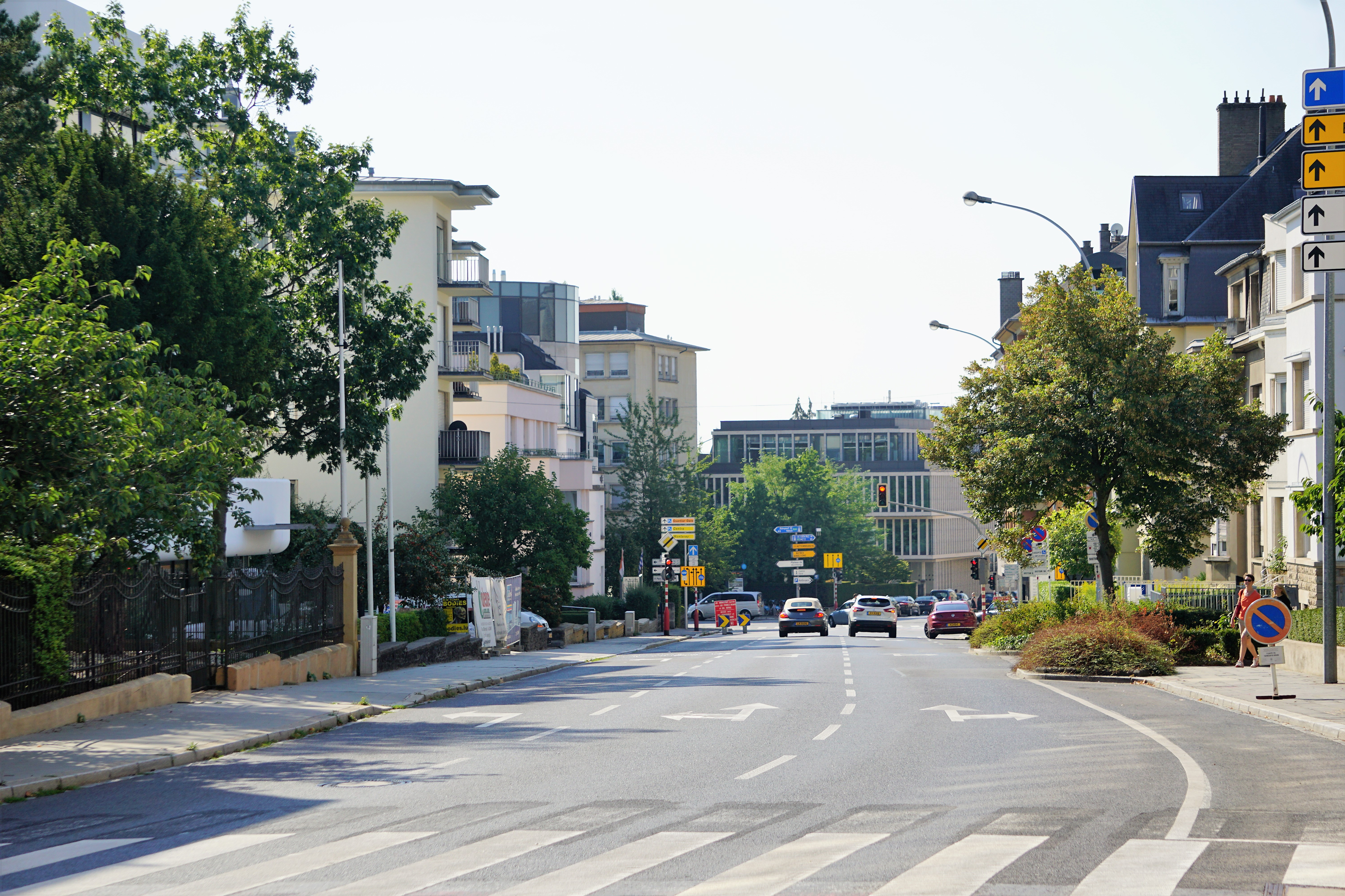 Luxemboug, Boulevard Grande-duchesse Charlotte, à hauteur de la Place Winston-Churchill. Vue en direction sud.